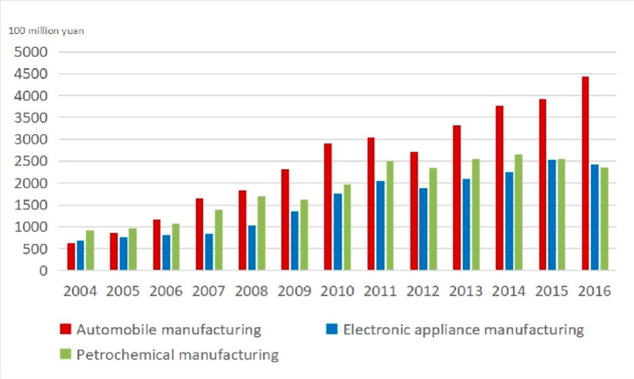 Three pillar industries in Guangzhou